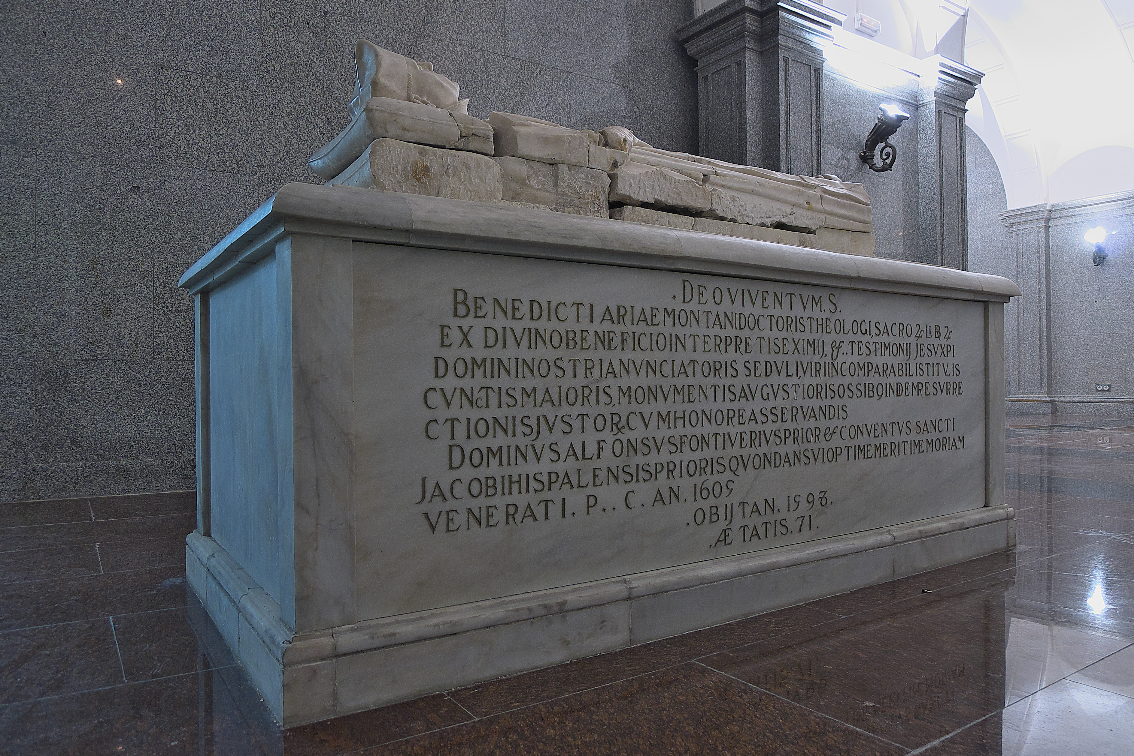 Sepulcro de Benito Arias Montano (1527-1598), procedente de la iglesia del Priorato de Santiago de la Espada, Sevilla. Epitafio: Consagrado al Señor de los vivientes D. Alonso de Fontiveros y Prior y el Convento de Santiago de Sevilla, venerando la memoria de su Prior en otro tiempo; óptimamente benemérito, pusieron y consagraron este monumento en año de 1605 para guardar con honor los huesos del varón incomparable por todo títulos, digno de mayor y mas augusto monumento. Benito Arias Montano, doctor teólogo, intérprete admirable, por Divino beneficio, de los sagrados libros y atentísimo explicador del testimonio de Jesucristo Nuestro Señor. Murió en 1598 a la edad de 71 años. "Año 1606"